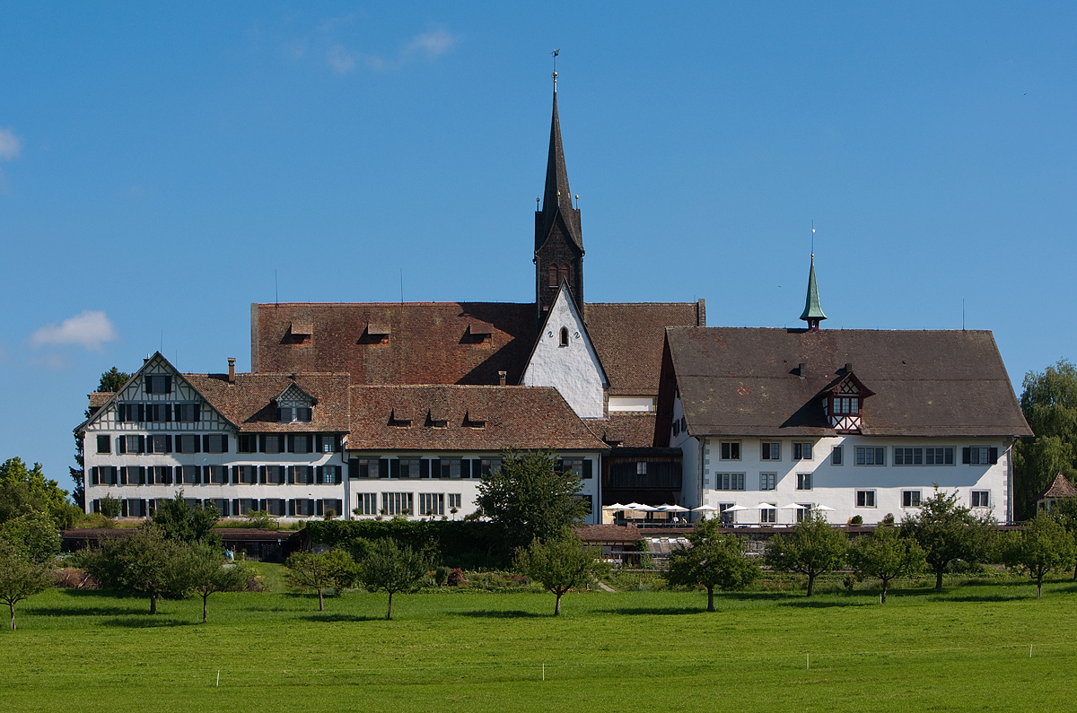 Das ehemalige Kloster in Kappel am Albis.